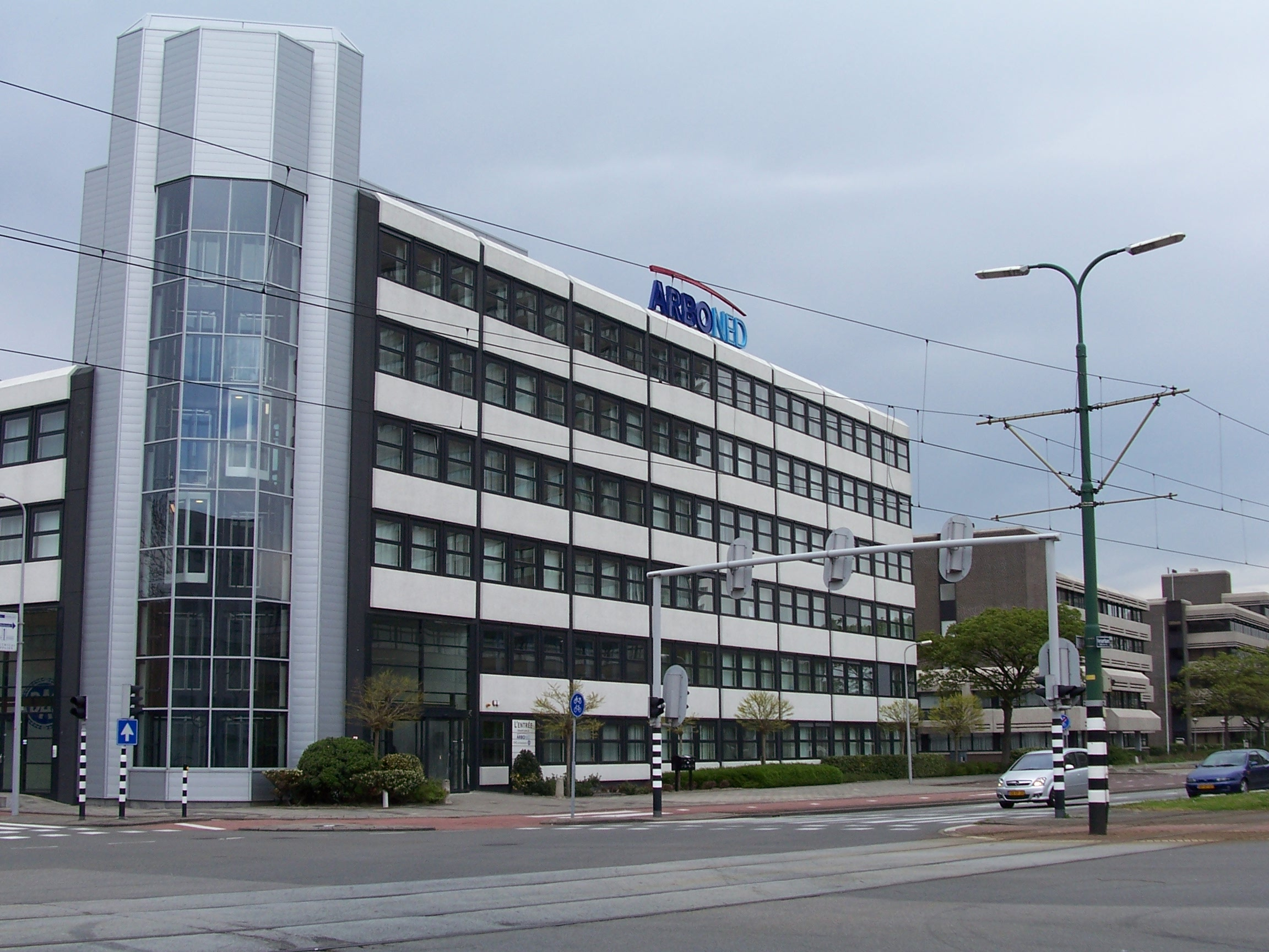 ArboNed office in Rijswijk